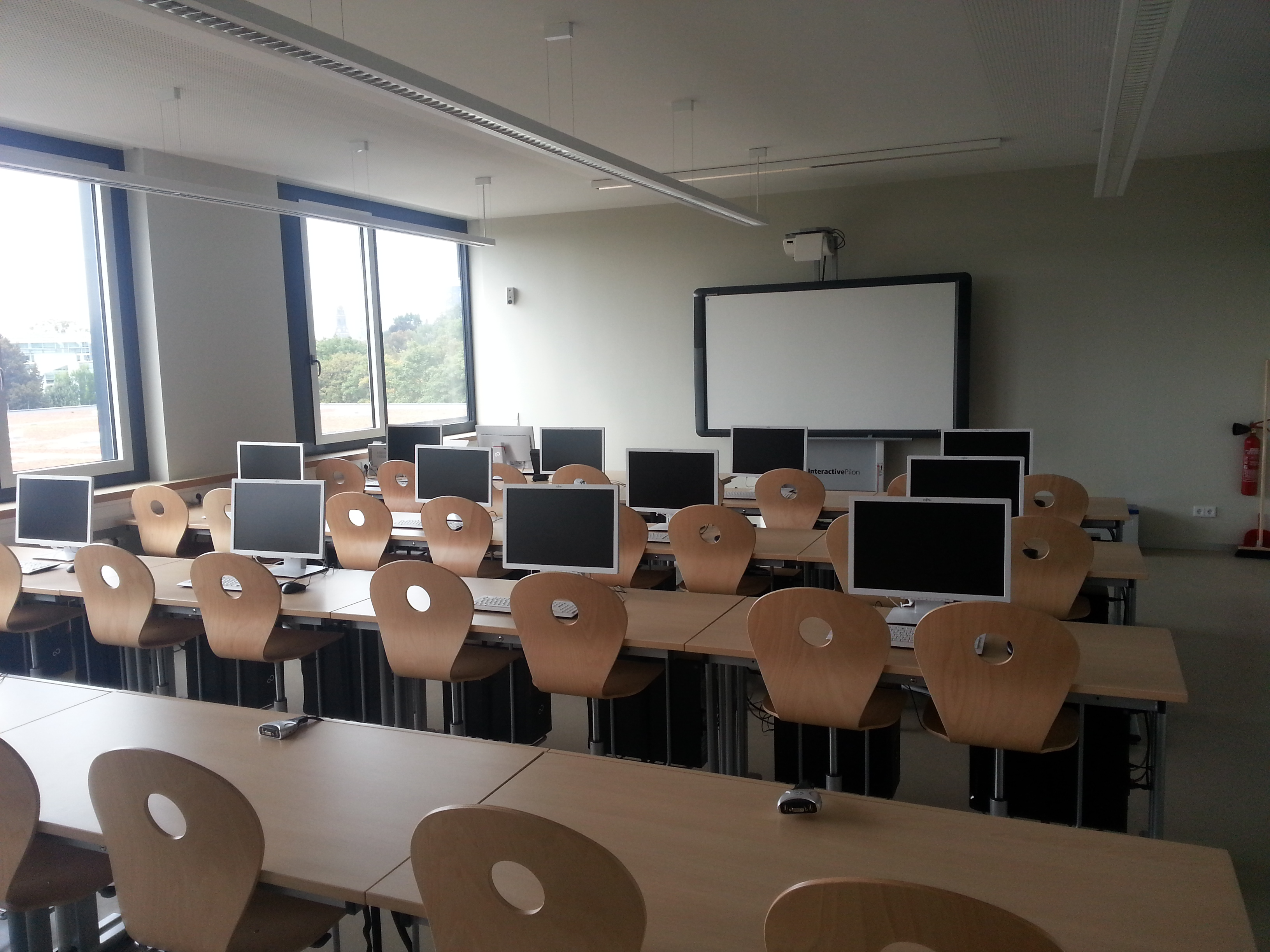 Ein Unterrichtsraum am neugebauten Gymnasium Bürgerwiese, der auch vom Schülerrechenzentrum Dresden genutzt wird